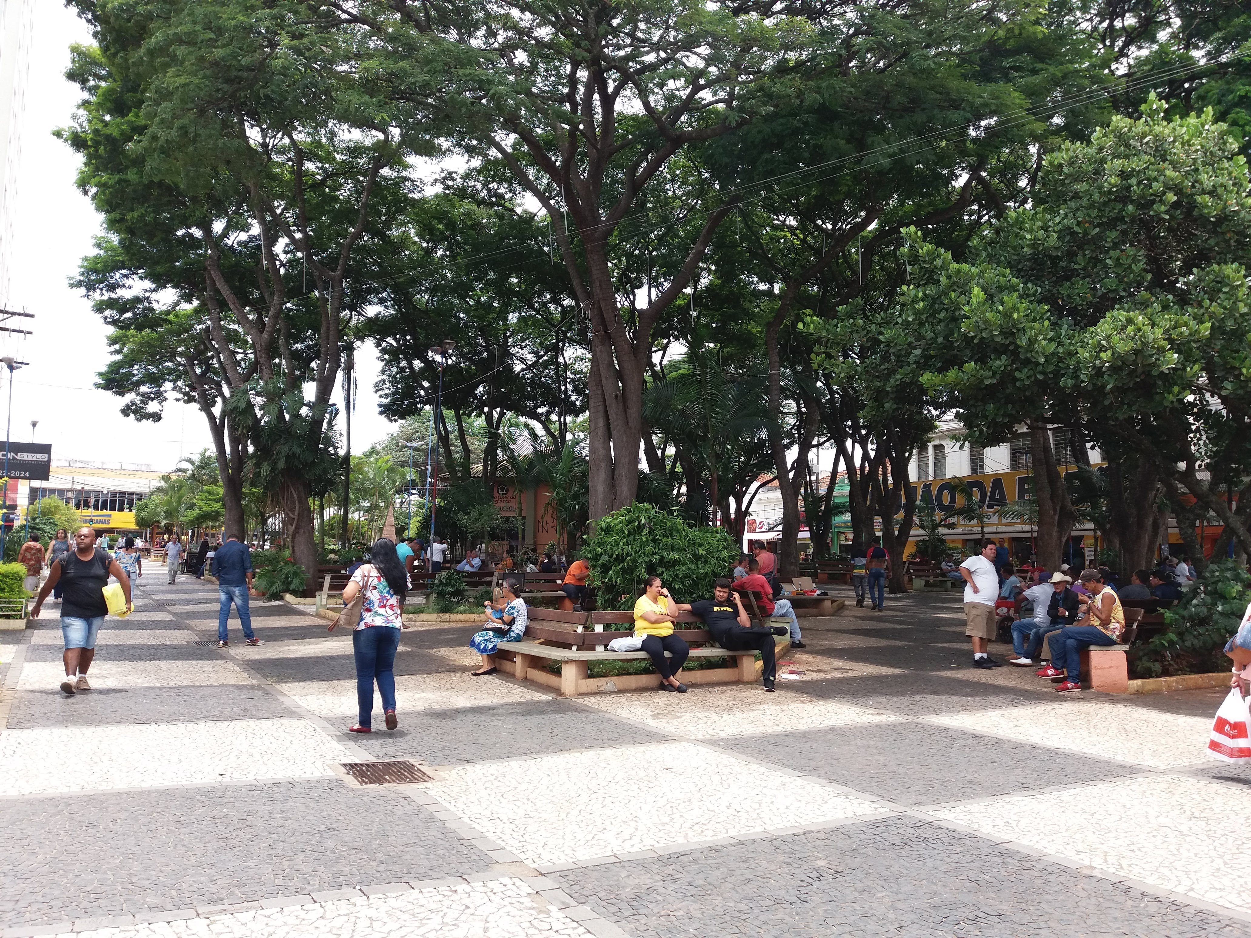 Praça Barão, Franca, SP